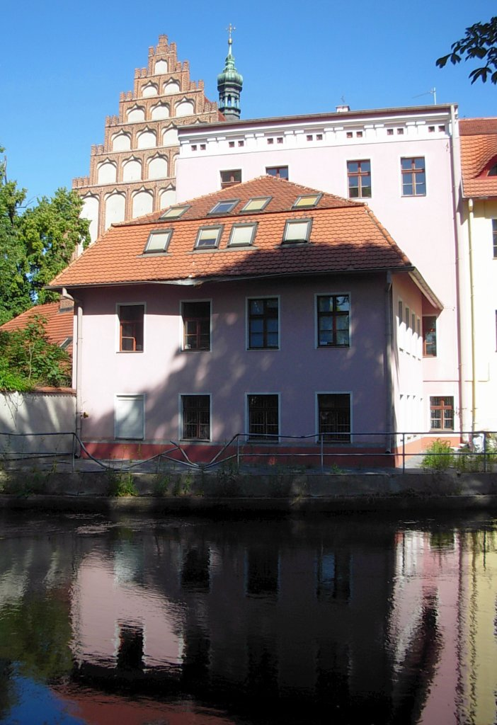 Ulica Przyrzecze w Bydgoszczy, Wenecja Bydgoska